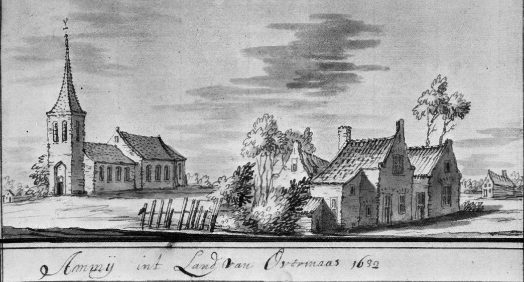 Overzichten: Gezicht op Ambie naar prent